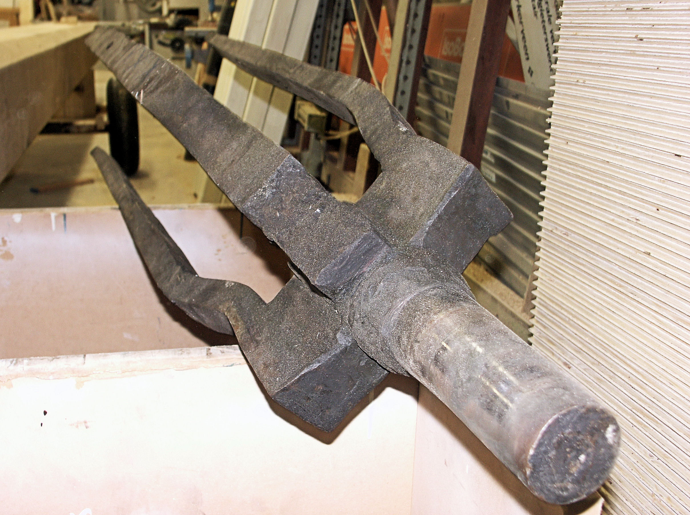 Poldermolen Zuilichem, Netherlands; tap van de koningsspil